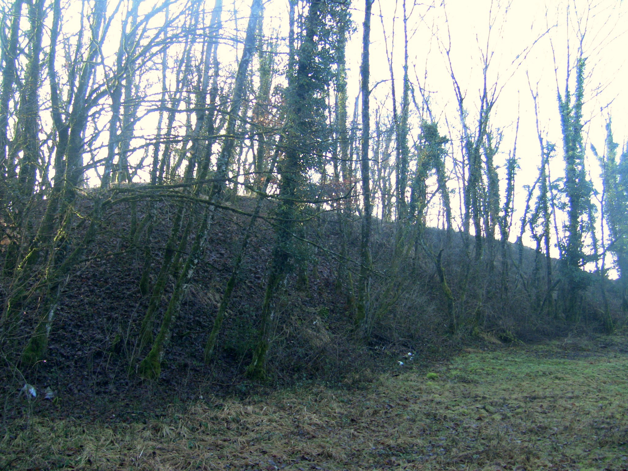 Le massif de terre accueillant le magasin et l'abris annexe sud-ouest du fort de Planoise, à Besançon (Doubs, France).